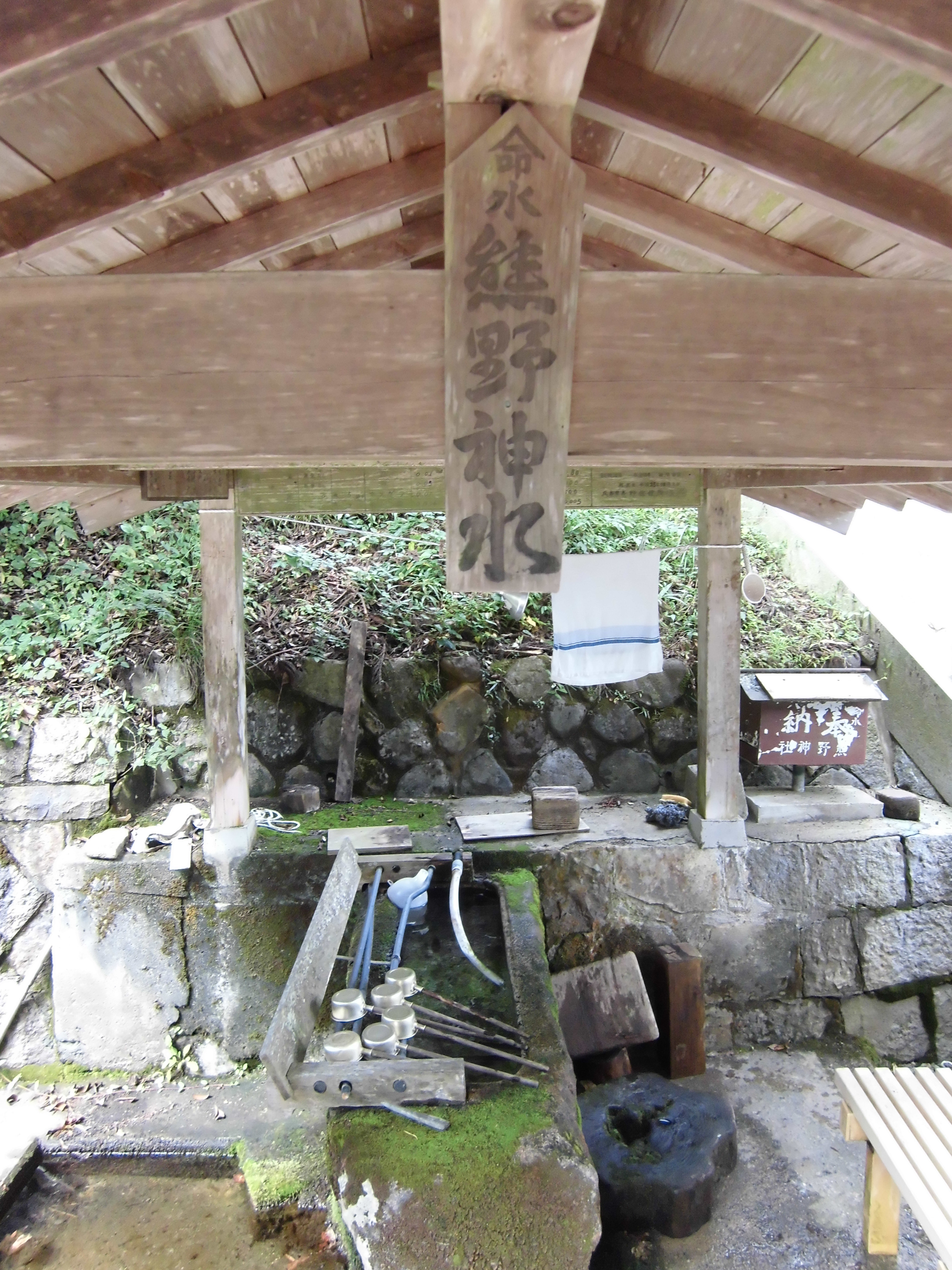 兵庫県神河町 熊野神社 熊野神水